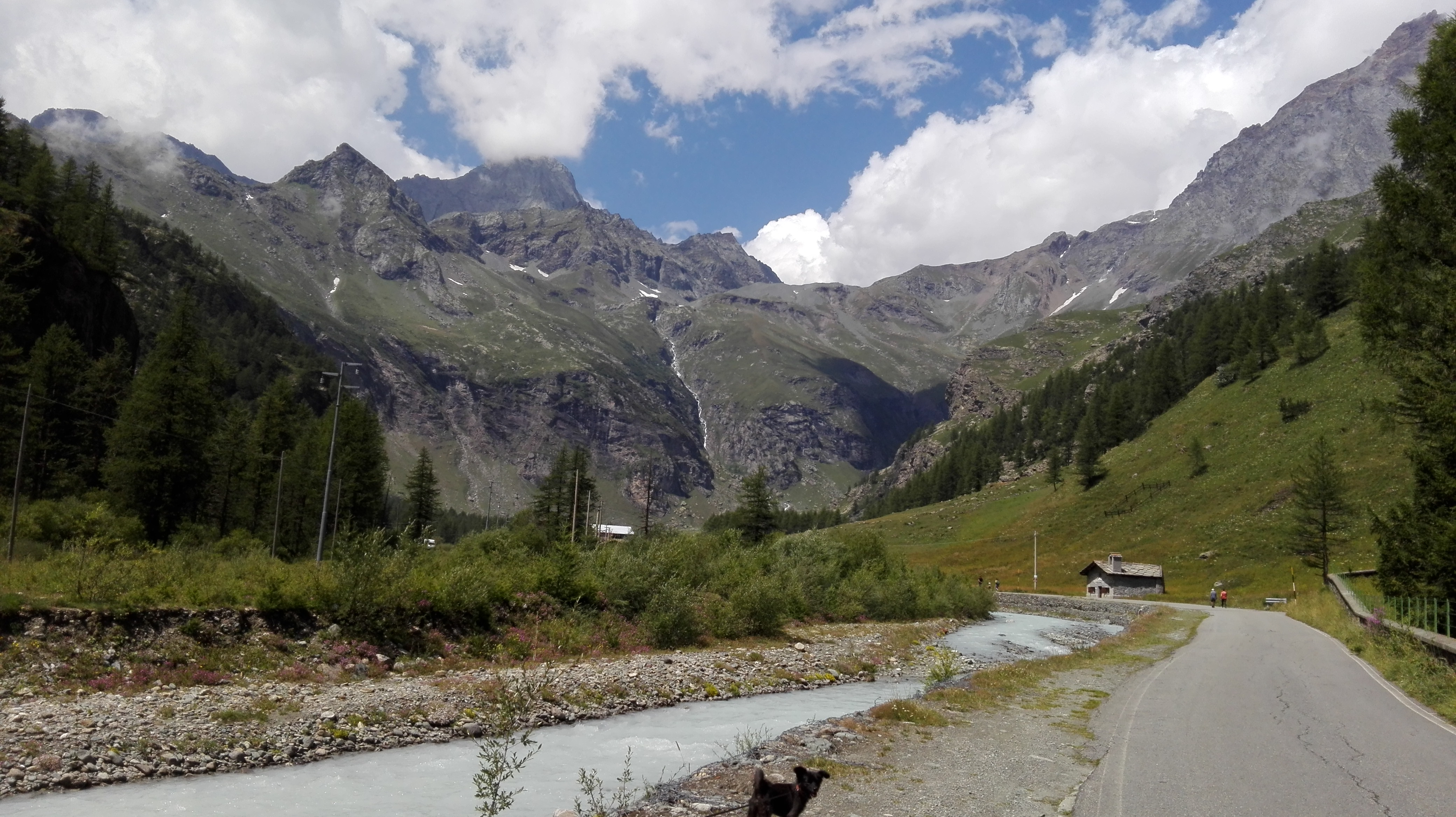 Pian della Mussa (Balme) (Q49964105)